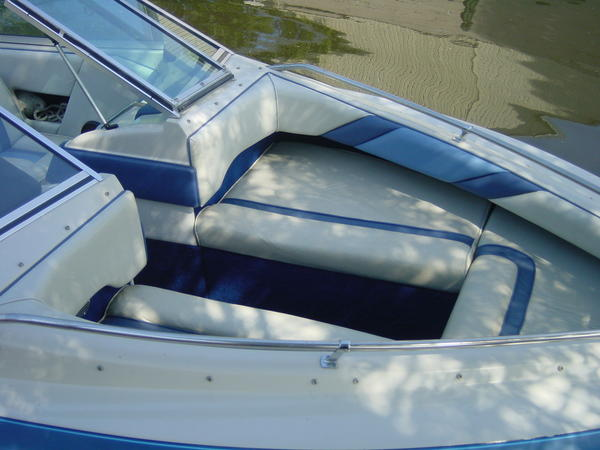 Bugbereich eines Bowriders